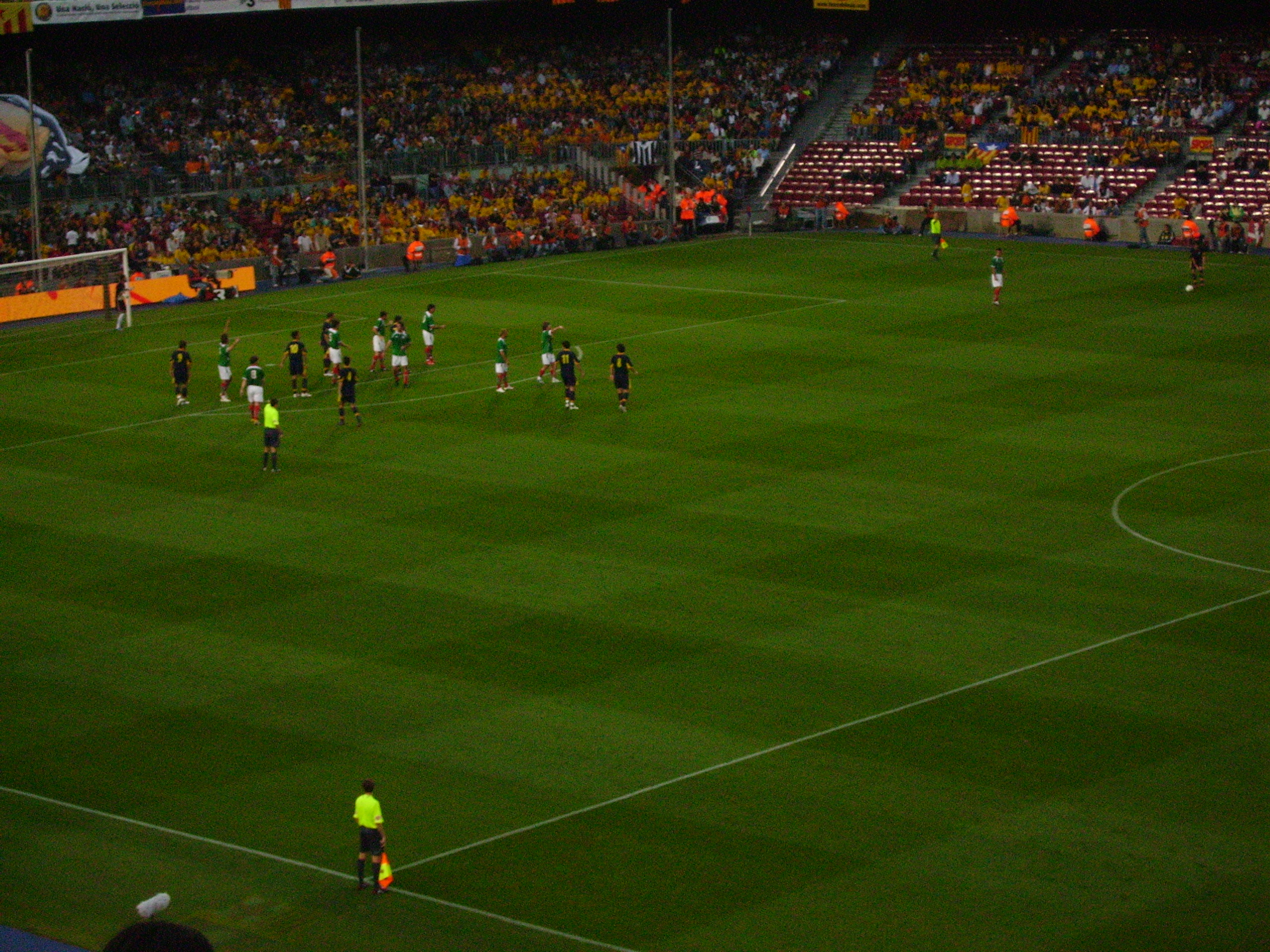 Catalunya-Euskadi, 8/10/2006 al Camp Nou.